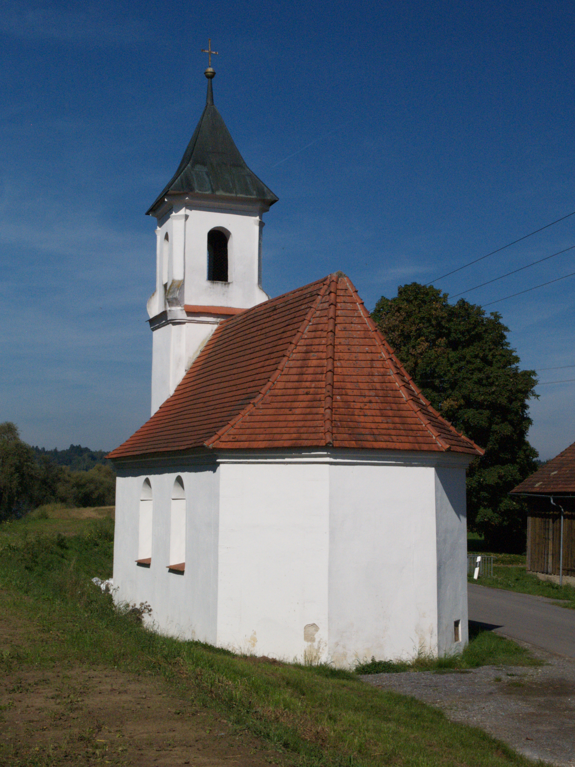 Sankt Koloman in Lenzing, Gemeinde Niederwinkling